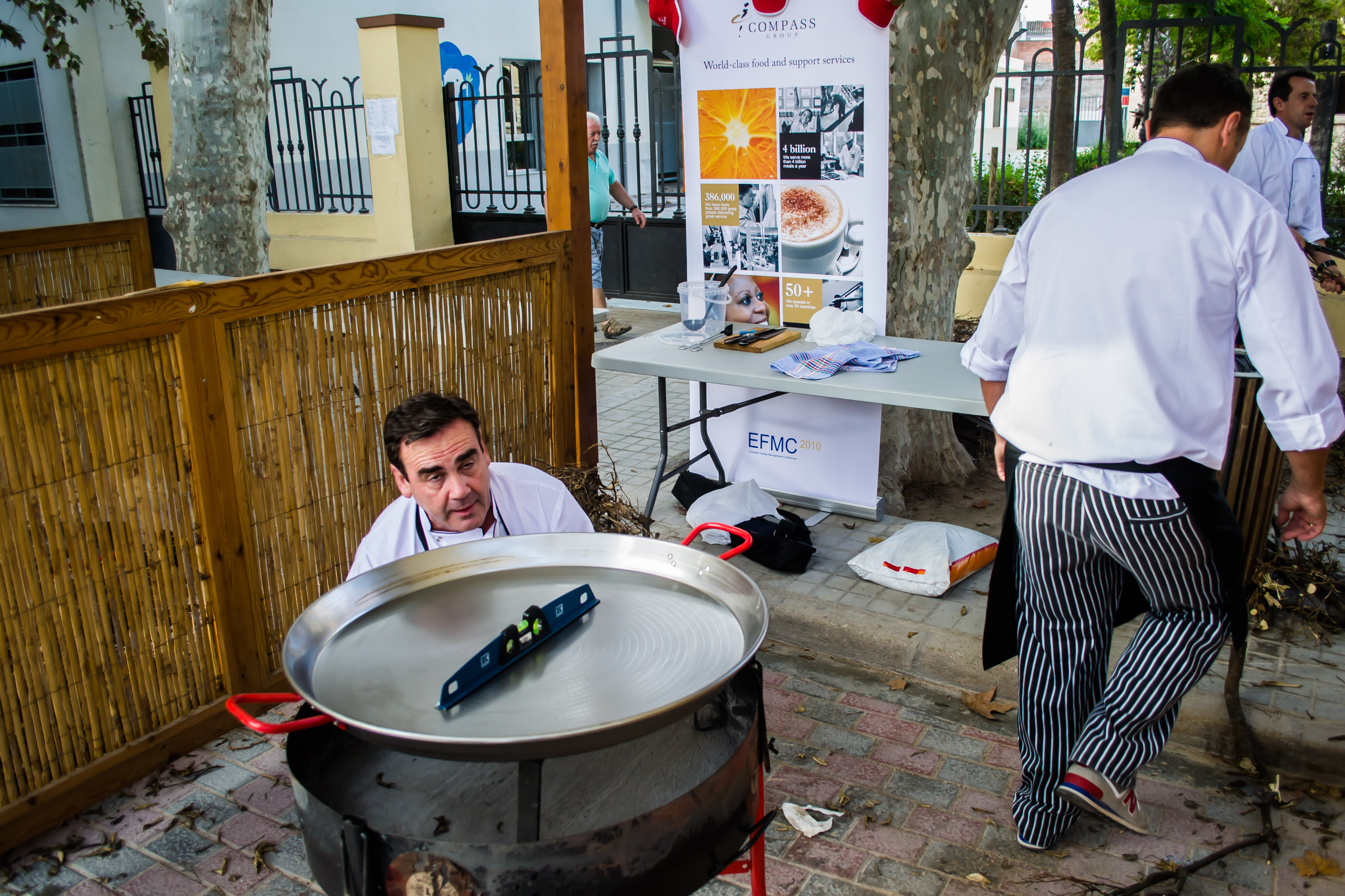 Imágenes del 56 Concurso Internacional de Paellas de Sueca.